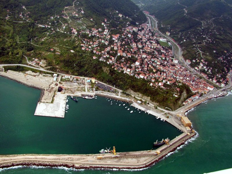 Karadeniz Tırpanı "İNEBOLU"